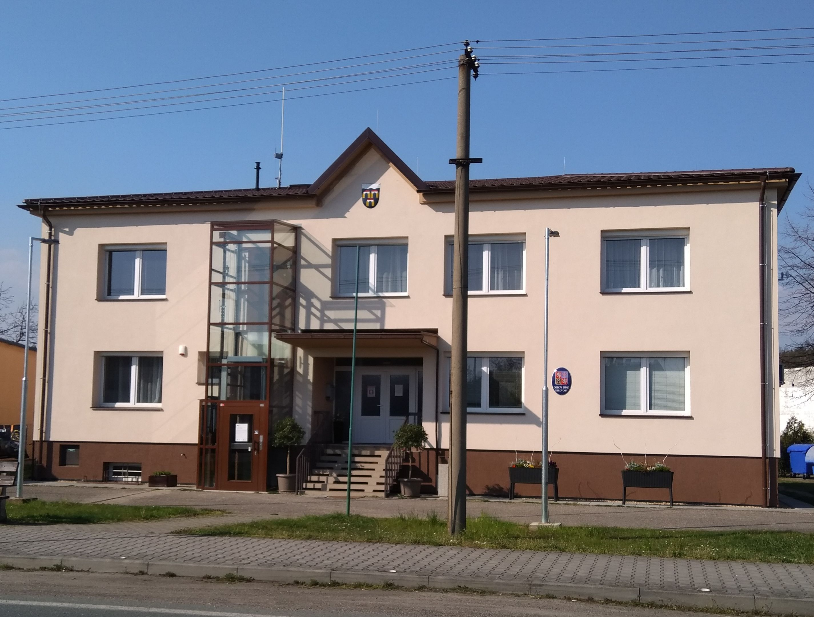 Budova obecního úřadu Tři Dvory č. p. 271 po zateplení obálky budovy v roce 2019.